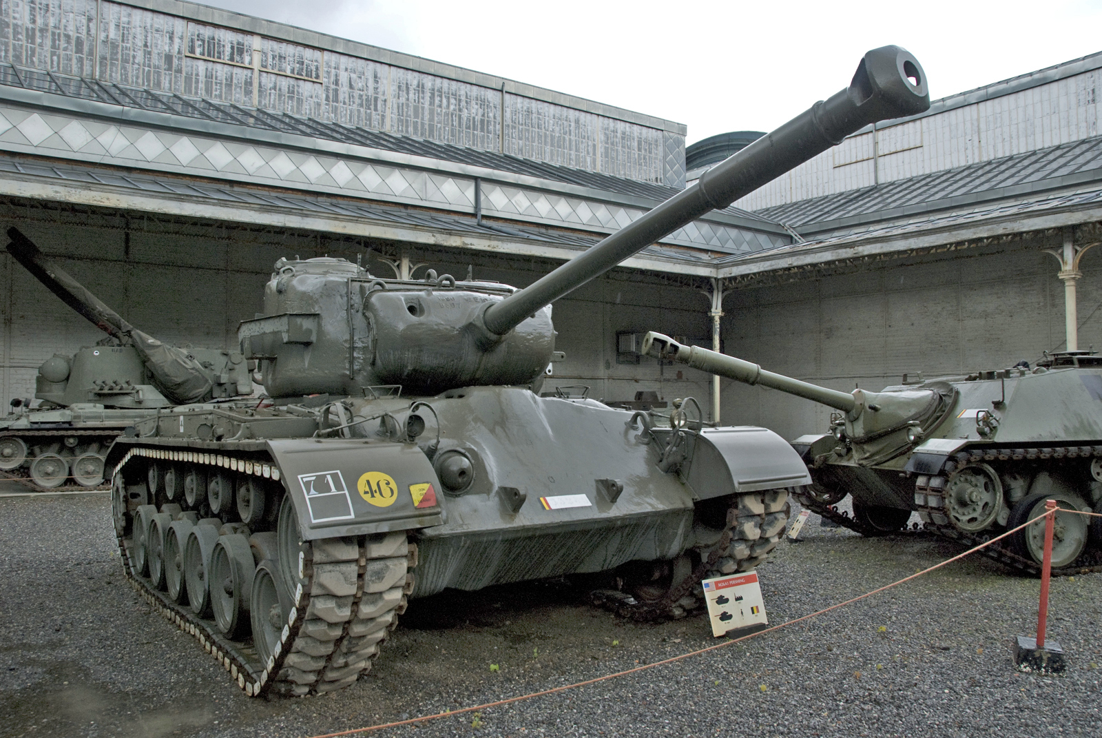 M26A1 at Army Museum Brussels. Left a Flakpanzer 'Gepard' ( right a Jagdpanzer 'Kanone' 90mm (